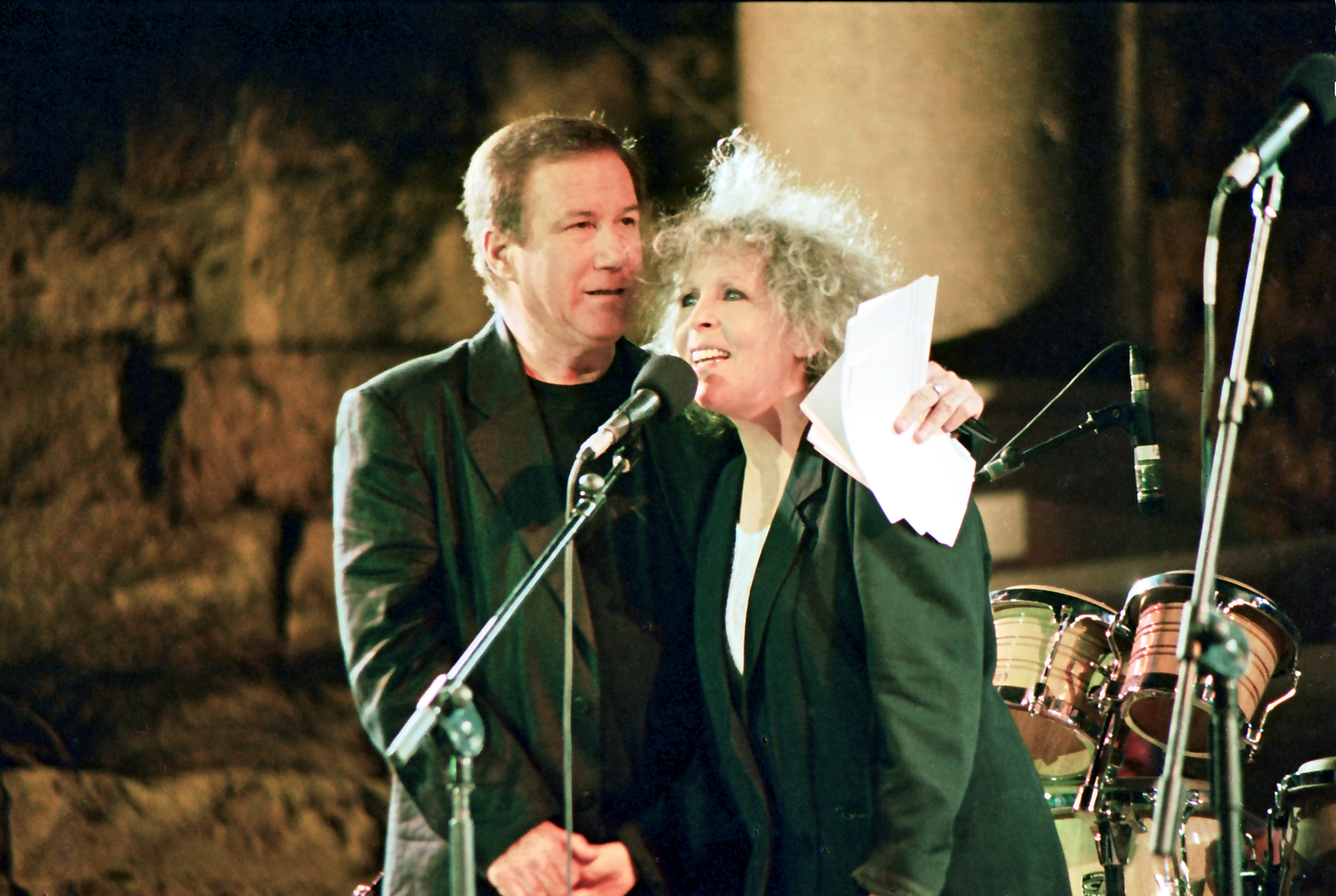 עופרה פוקס ואהוד מנור